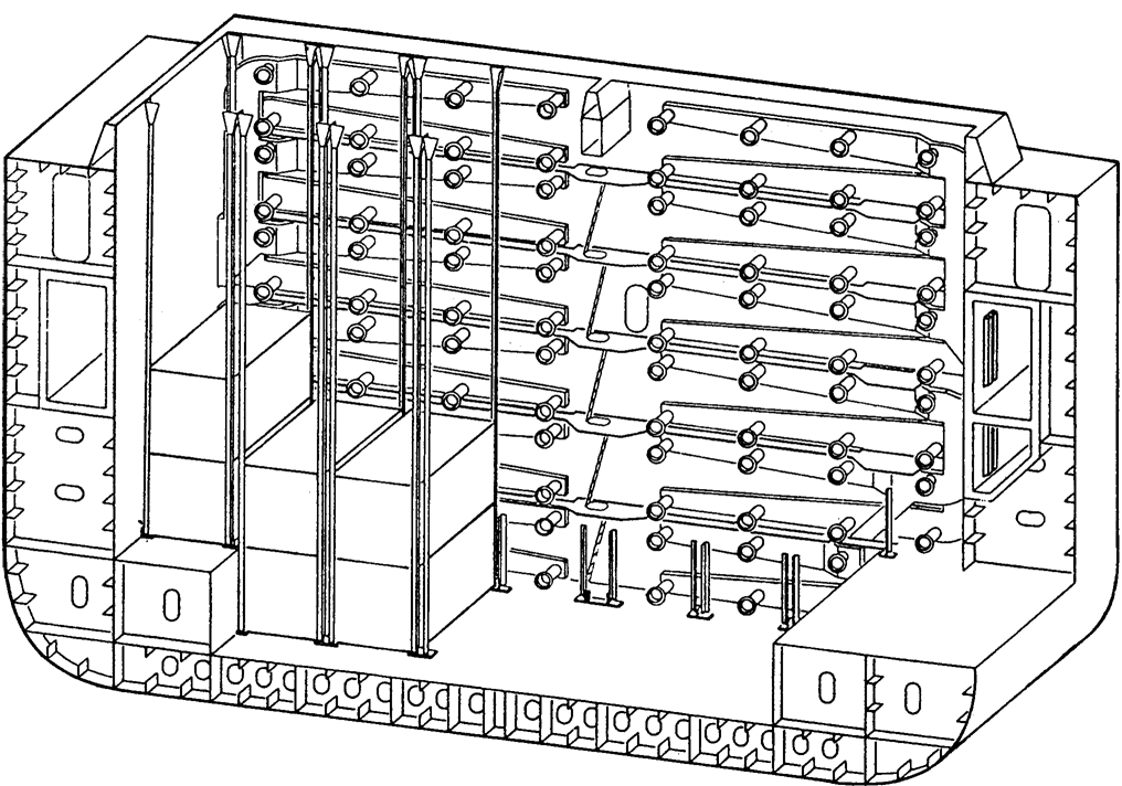 Waagrechte Kühlstäbe in Containerschiff-Laderaum (Schnittzeichnung)